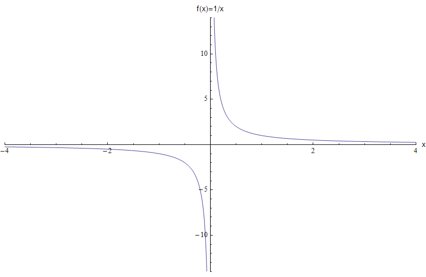 GraphKehrwertfunktion